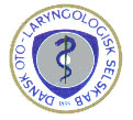 Gammelt logo 1974-1991